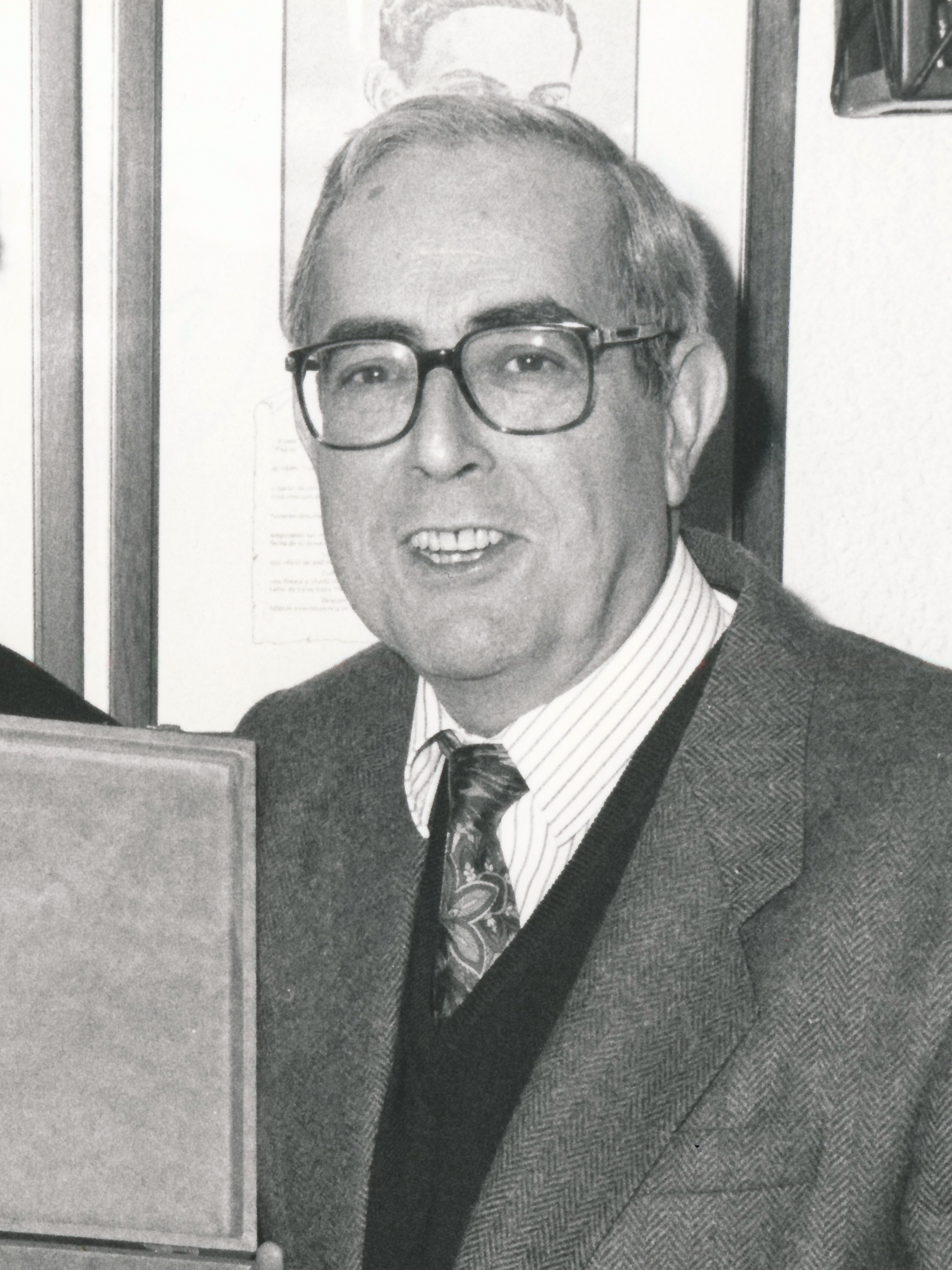 Demetrio Gutiérrez Alarcón periodista